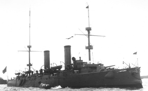 Крейсер "Хай-Чи". Фото